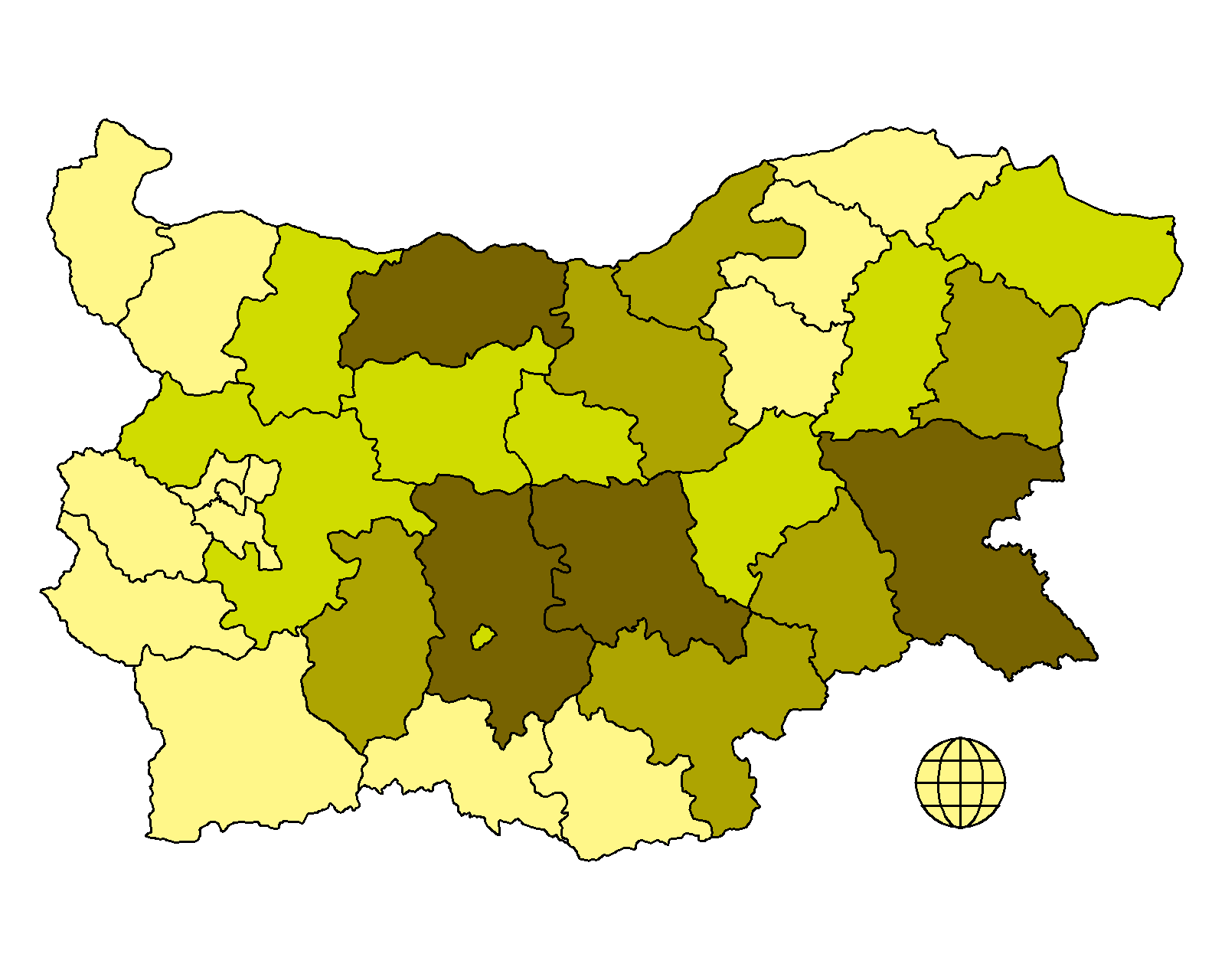 Гласуване по райони за Атака на изборите за Европейски парламент през 2007. Всеки от цветовете съответства на приблизително 1/4 от подадените гласове По тъмният цвят съответства на получен по-голям процент от гласовете